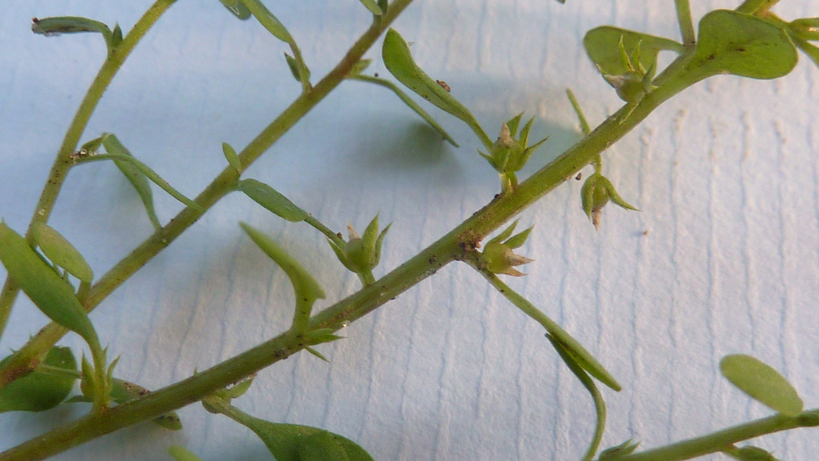 Anagallis minima (L.) Krause